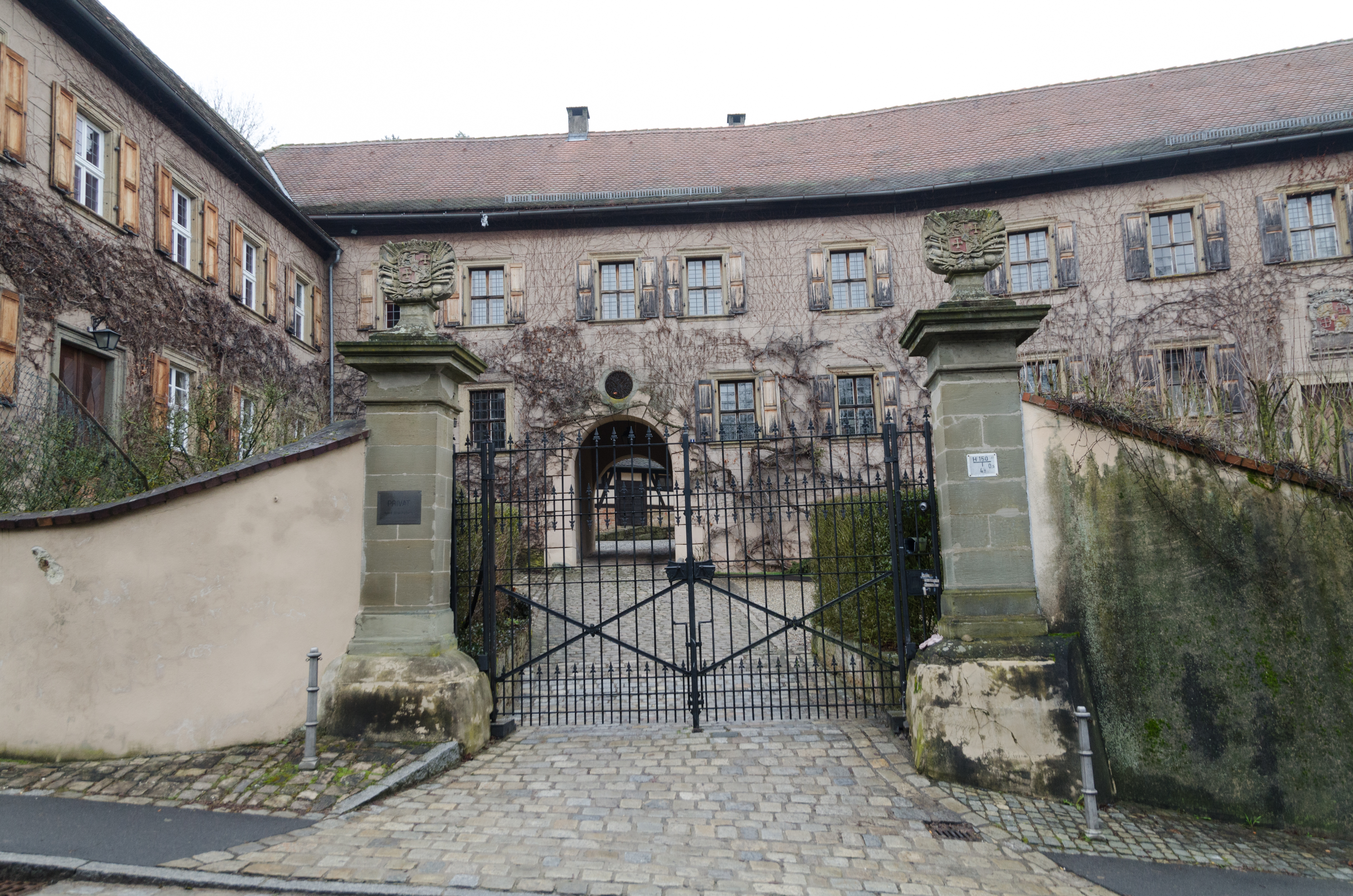 Schlüsselfeld, Aschbach, Kaulberg 4, Schloss